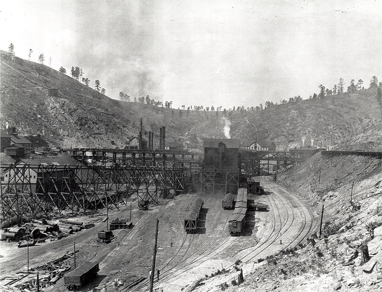 Cambria: gli impianti all'aperto di una miniera